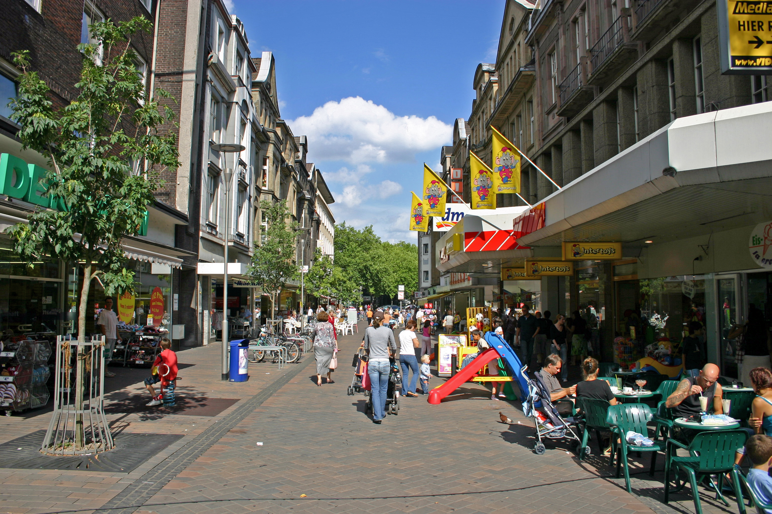 Jägerstraße in Duisburg-Hamborn (Richtung Altmarkt) / Nordrhein-Westfalen